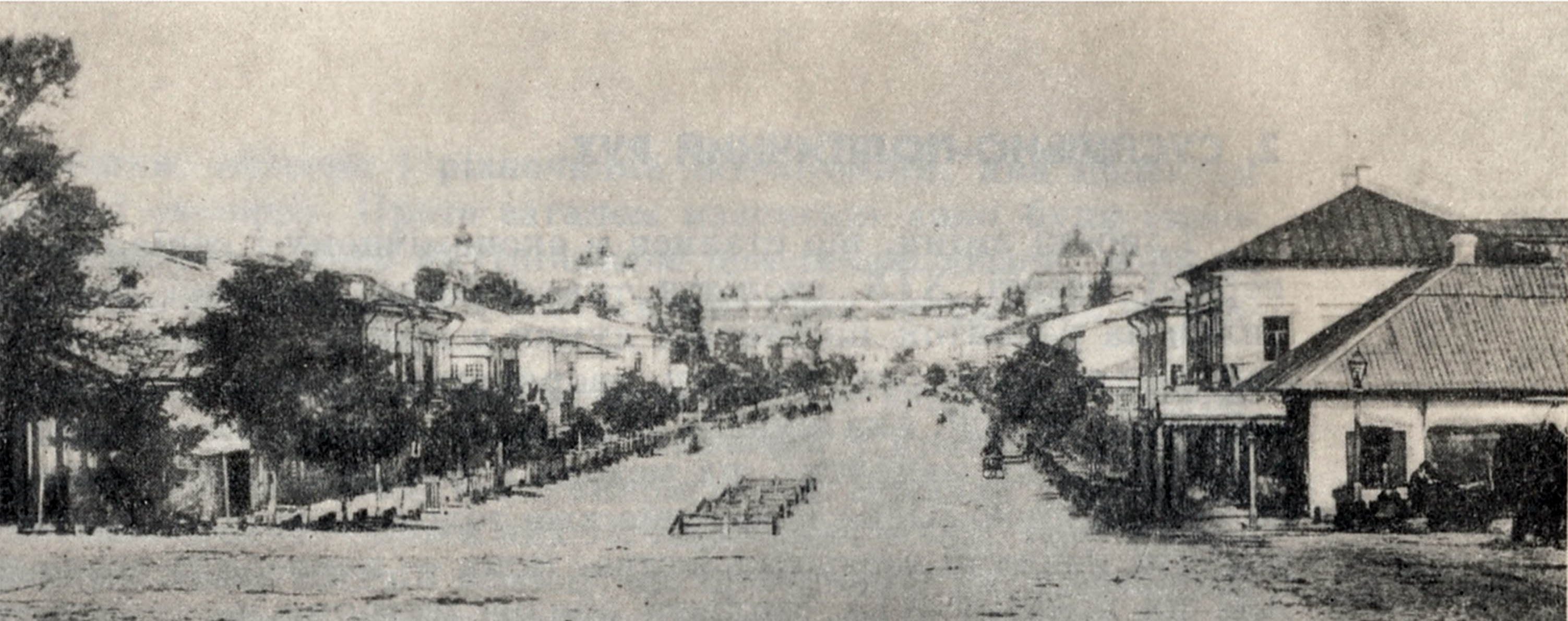 Хрещатик, середина ХІХ ст. Світлина